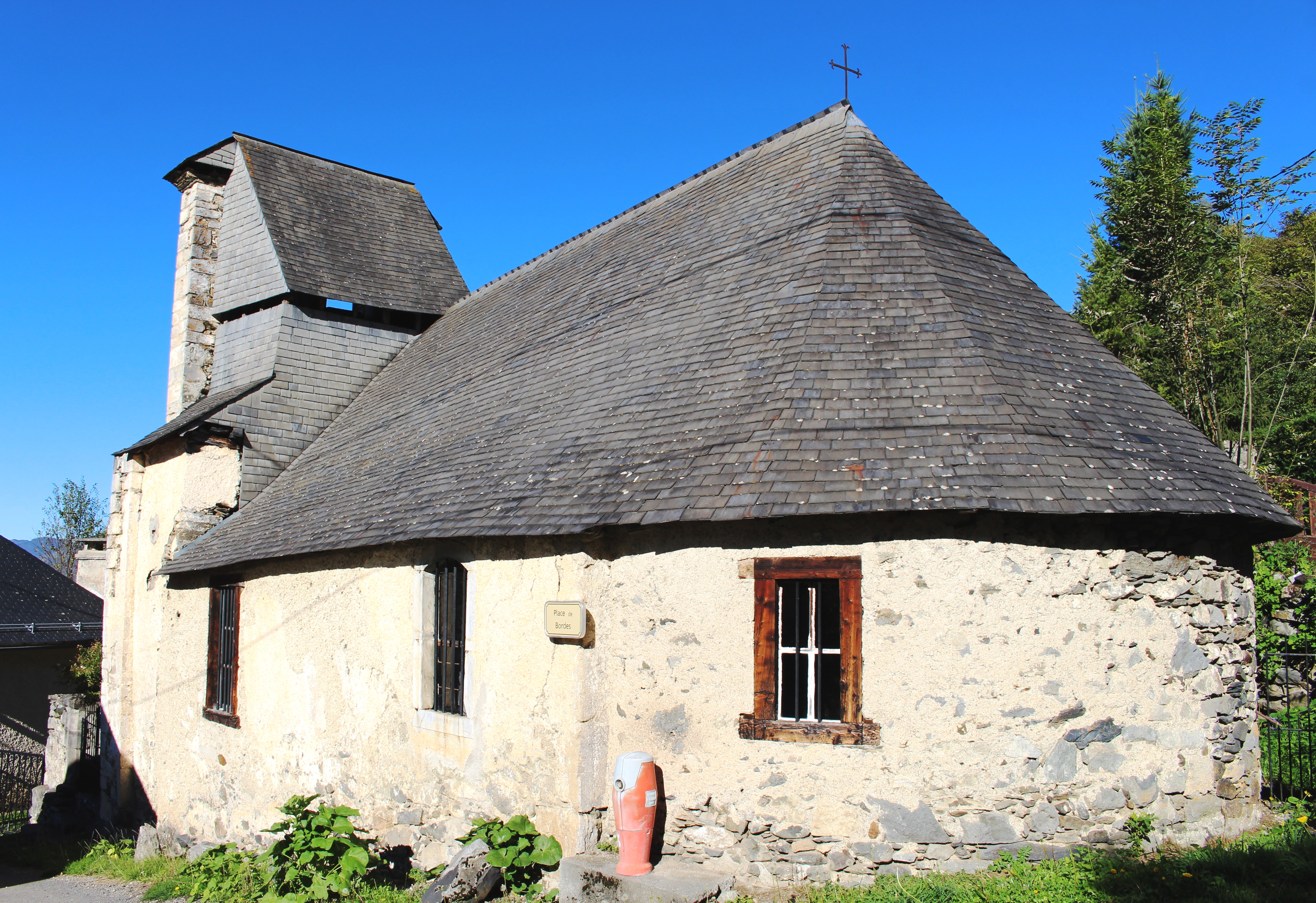 Chapelle de Bordes (Vier-Bordes) (Hautes-Pyrénées)